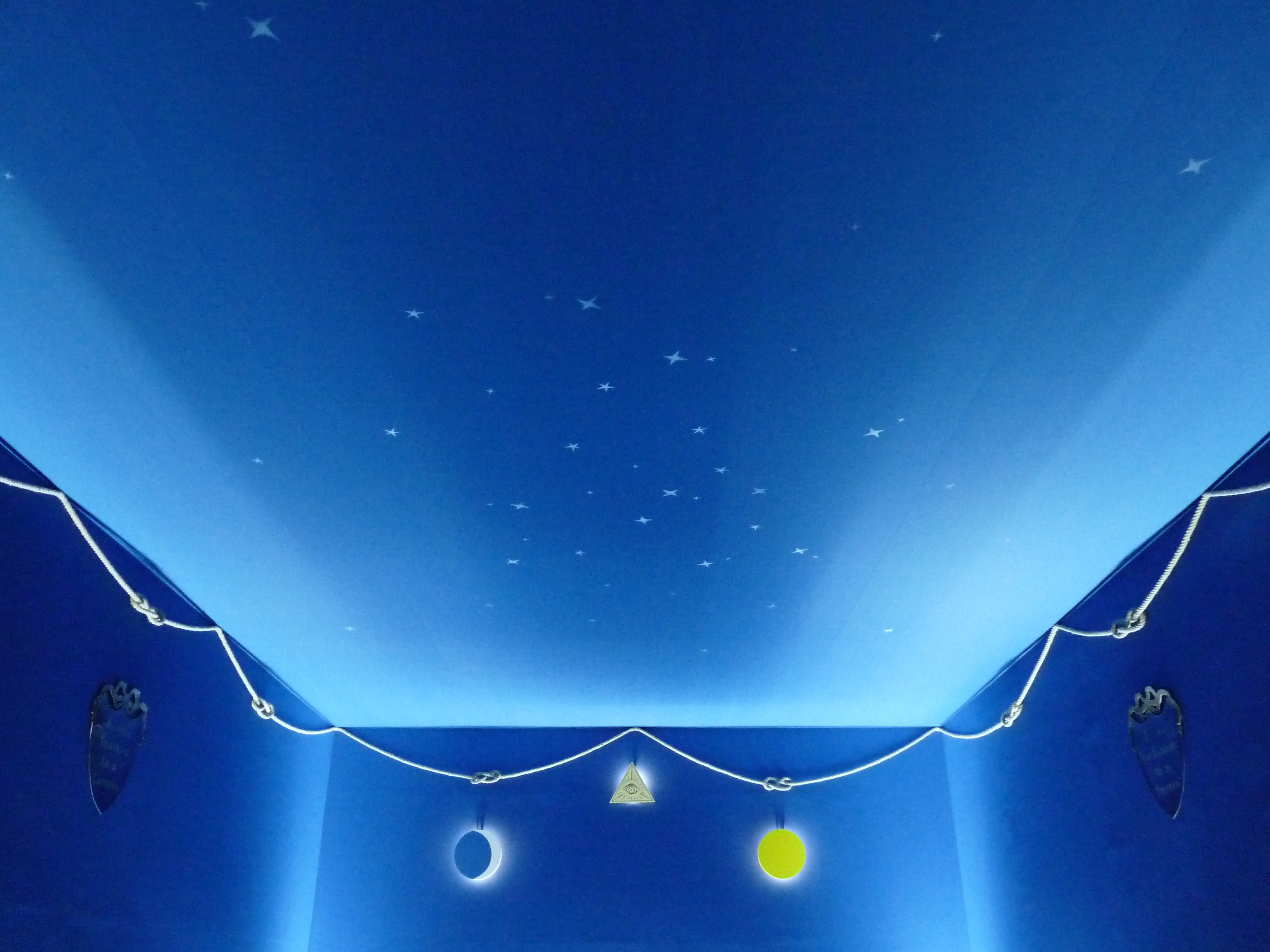 Voûte étoilée de temple maçonnique (reconstitution au Musée historique de Strasbourg dans le cadre d'une exposition temporaire)